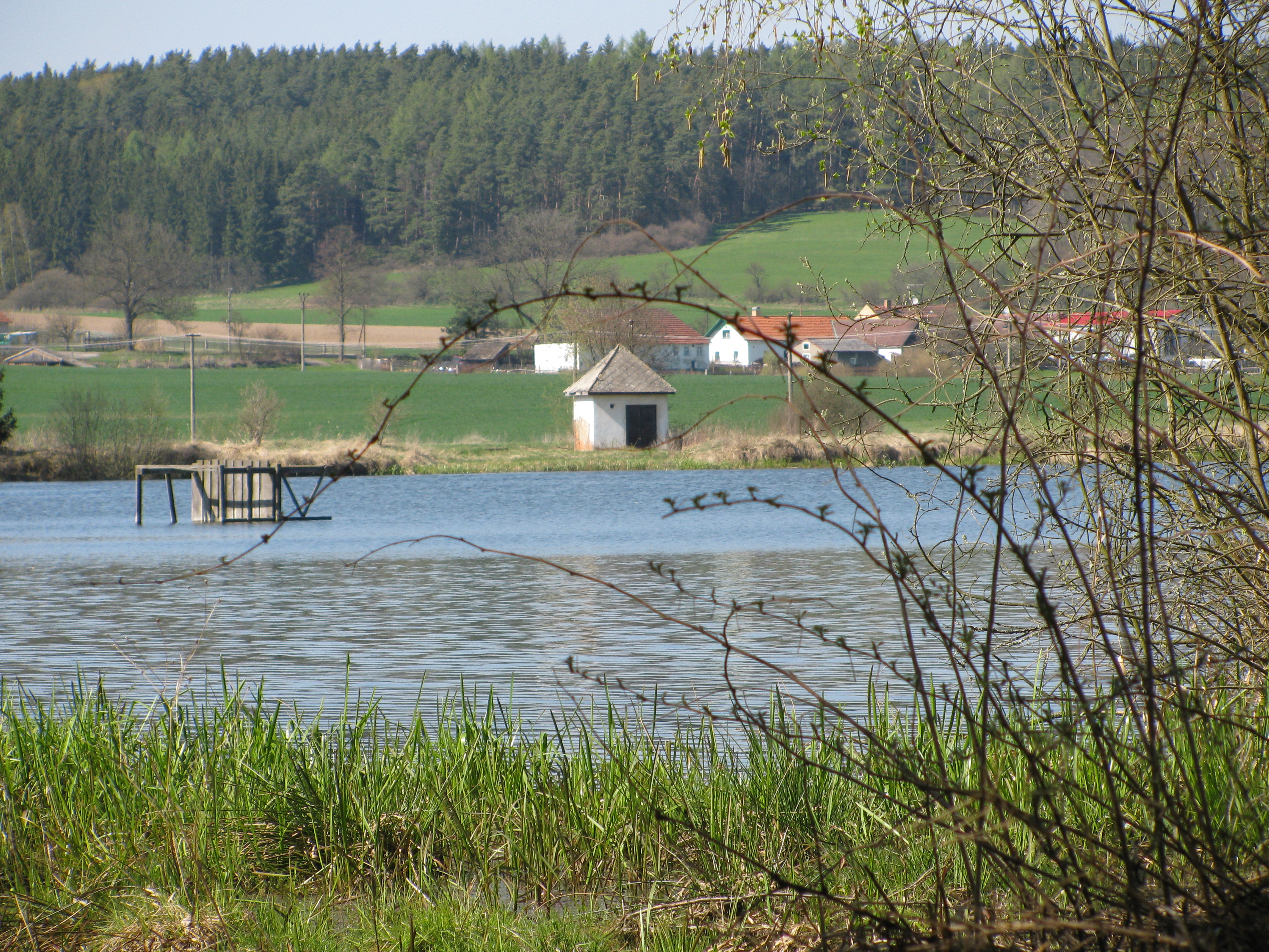 Pohled na Málkov (neidentifikovaný) od Velkého rybníka